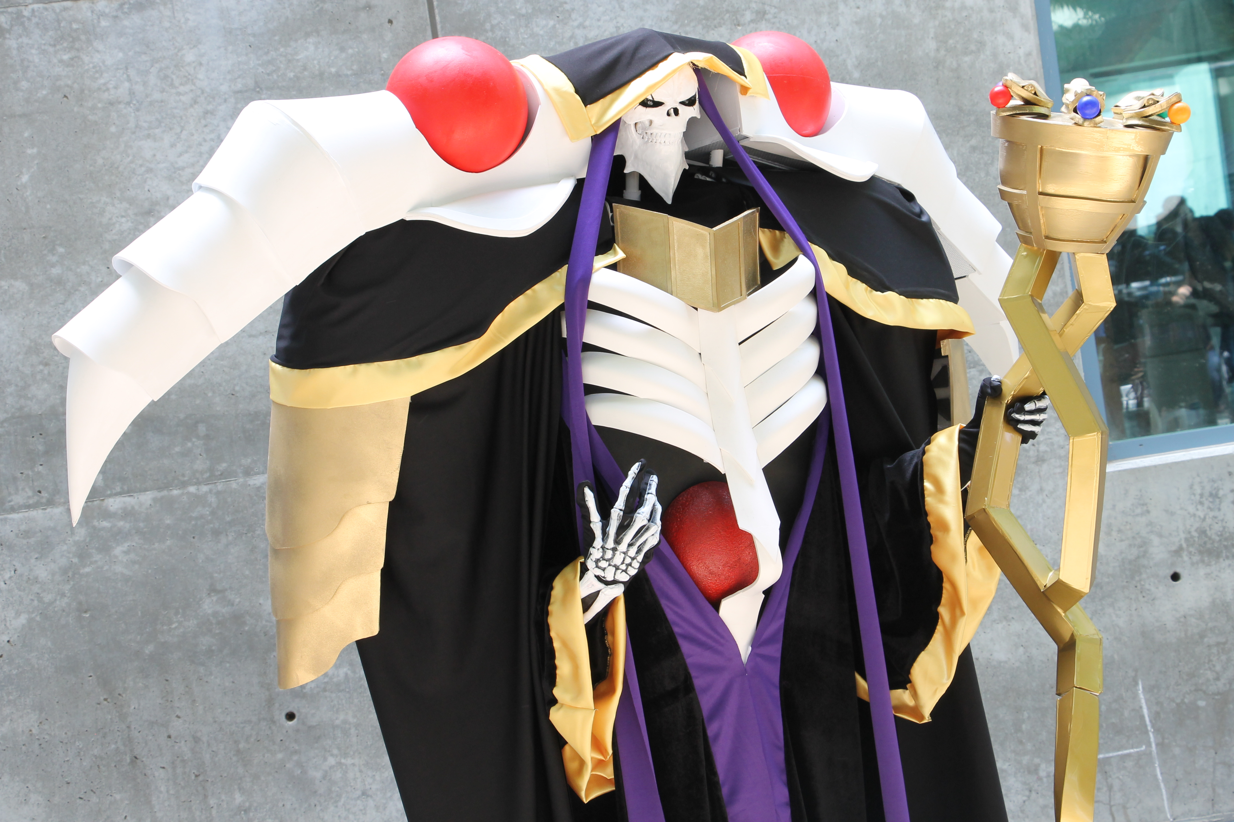 FanimeCon 2018 337